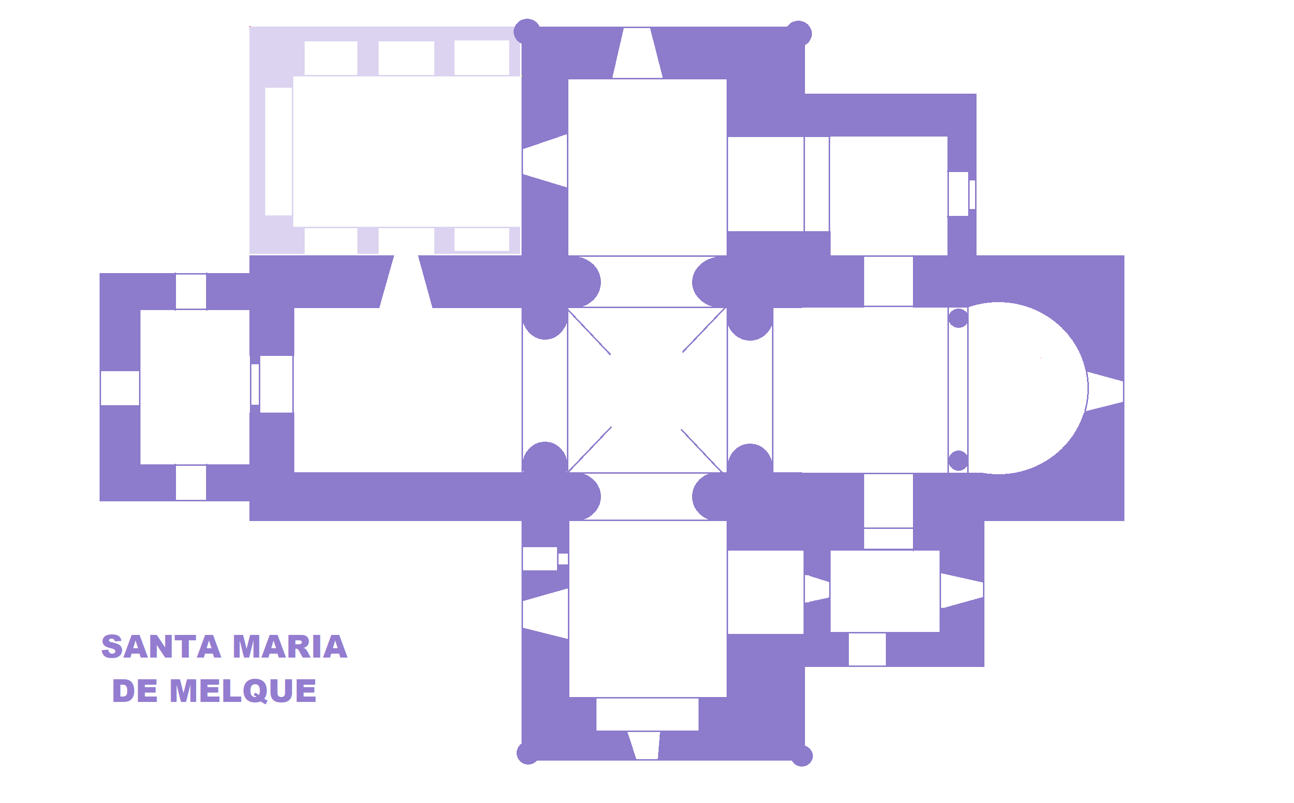 Eglise Santa Maria de Melque, Espagne, Plan